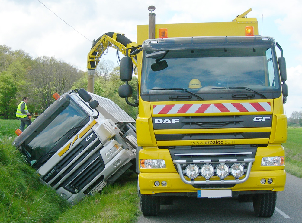 Nach einem Unfall interveniert ein Saugbagger, um den Transportaufbau eines LKW auszupumpen und somit das Abschleppen zu erleichtern.